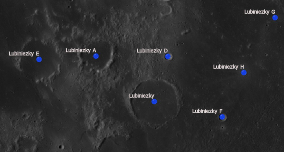 Cráter lunar Lubiniezky. Cráteres satélite. (Imagen LRO)